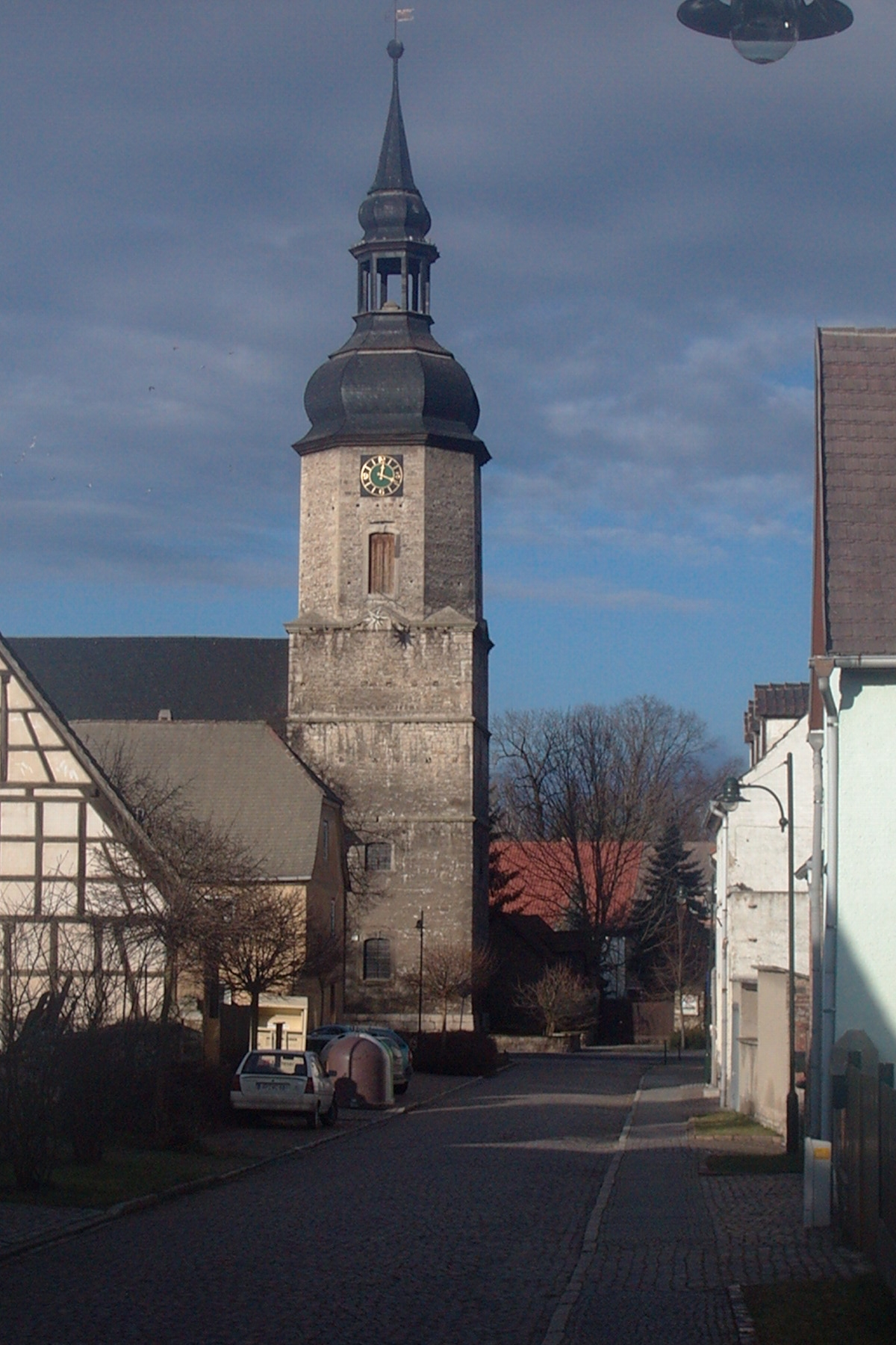 Die Kirche im Ortskern von Niedertrebra.